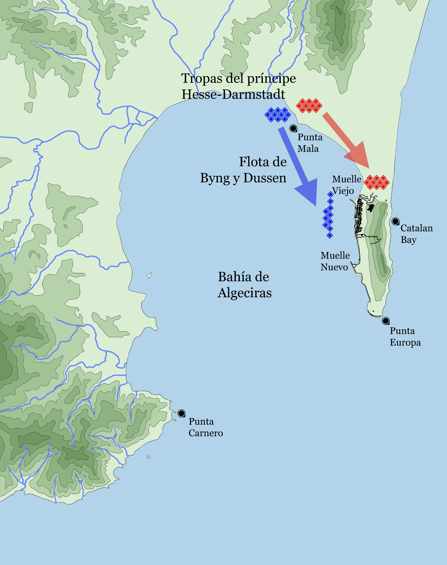 Mapa de situación de las tropas Angloholandesas en la Bahía de Algeciras durante el asedio de 1704.